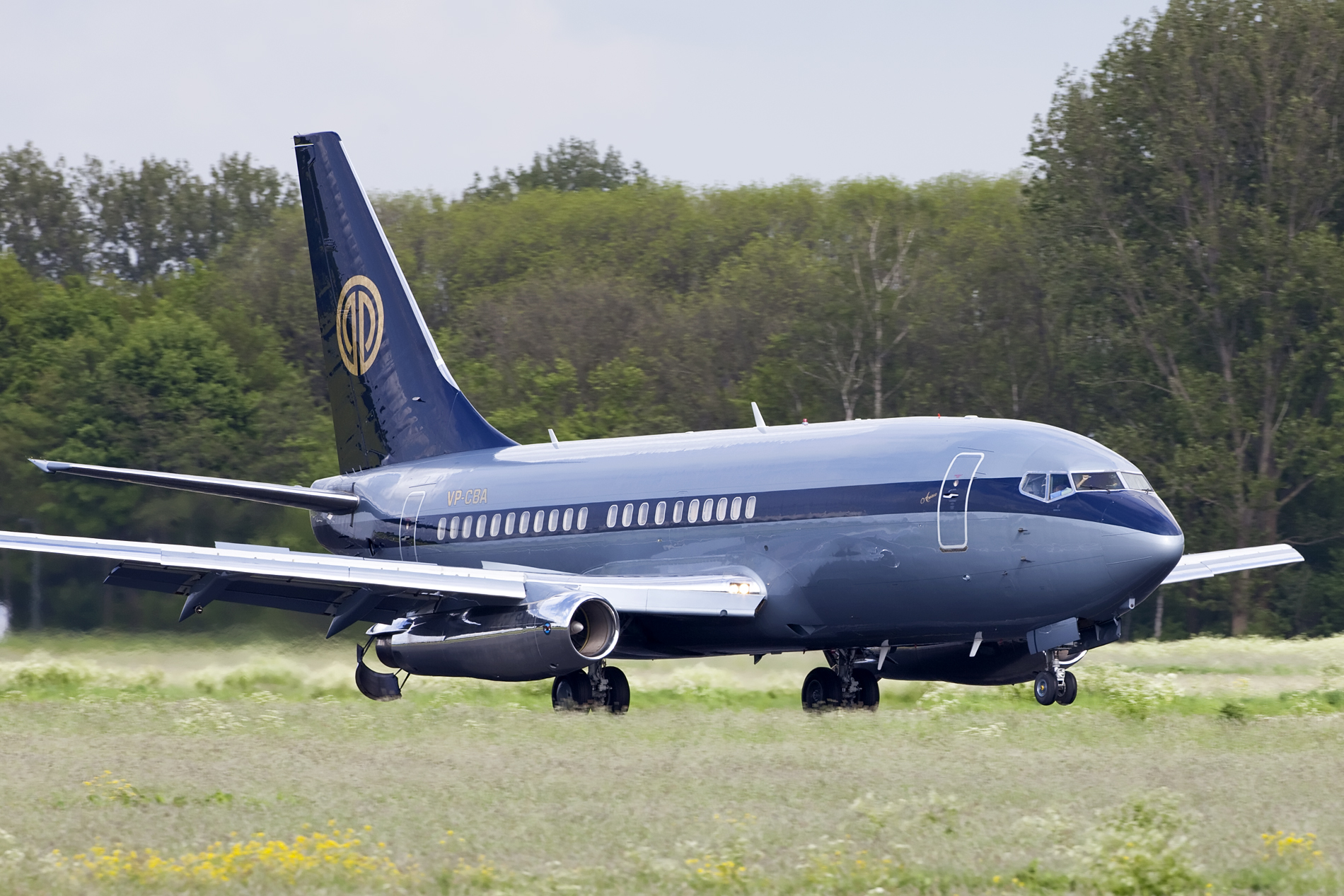 Rotterdam